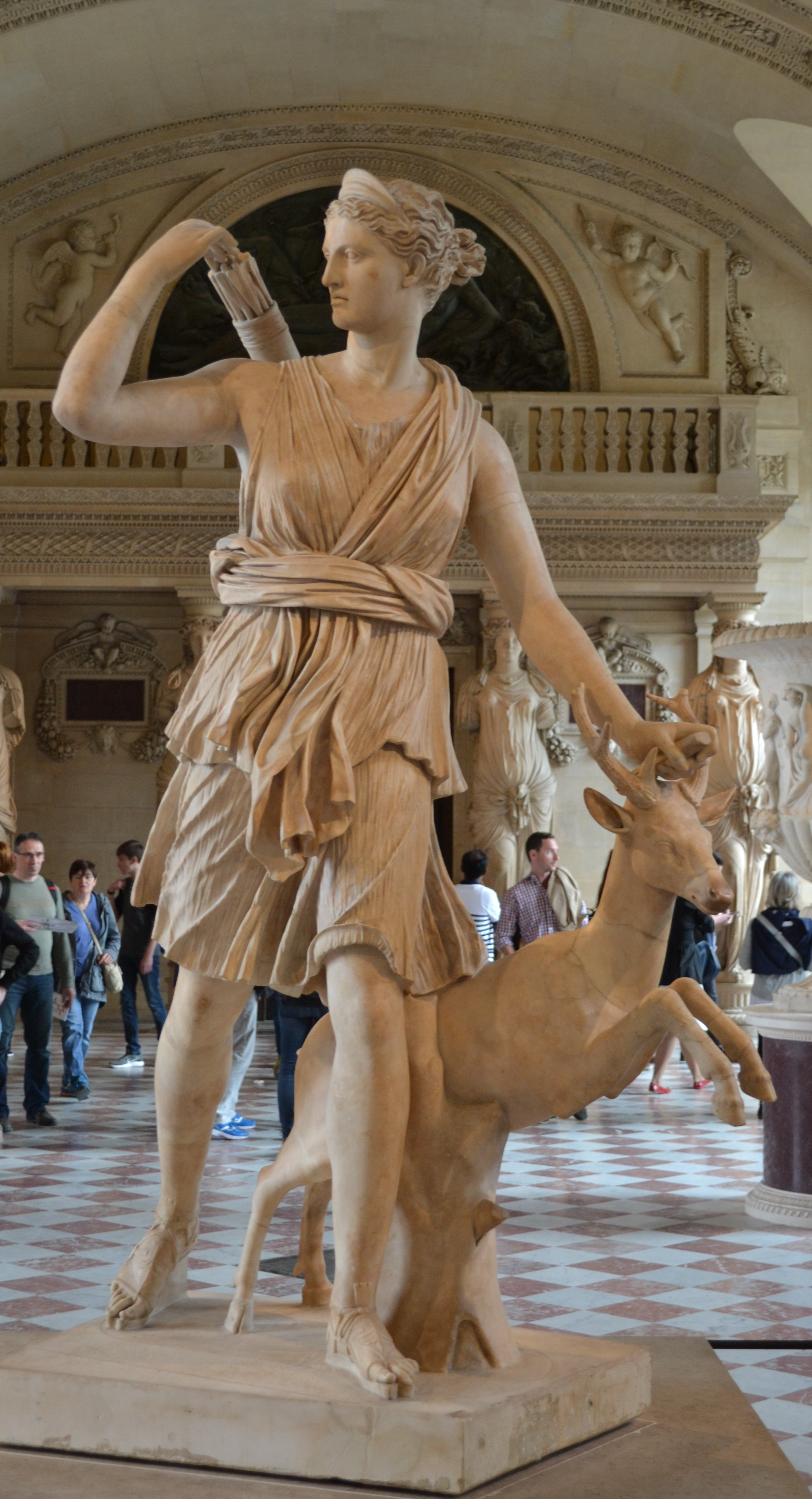 Artémis, déesse de la chasse, dite « Diane de Versailles » 2e siècle après J.-C., d’après un original grec vers 330 avant J.-C.